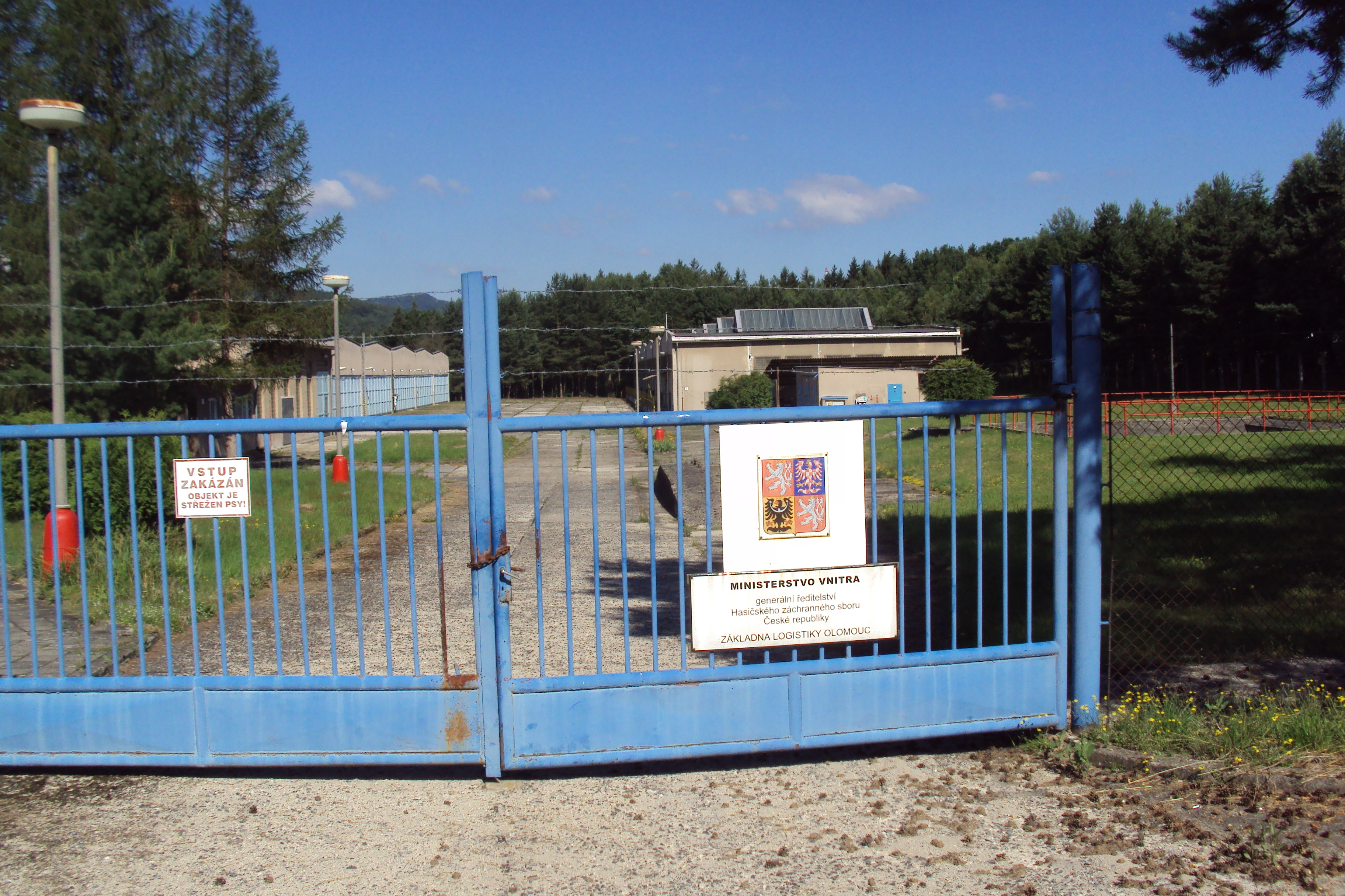 Sklad civilní obrany Ministerstva vnitra v Janově u Nového Boru